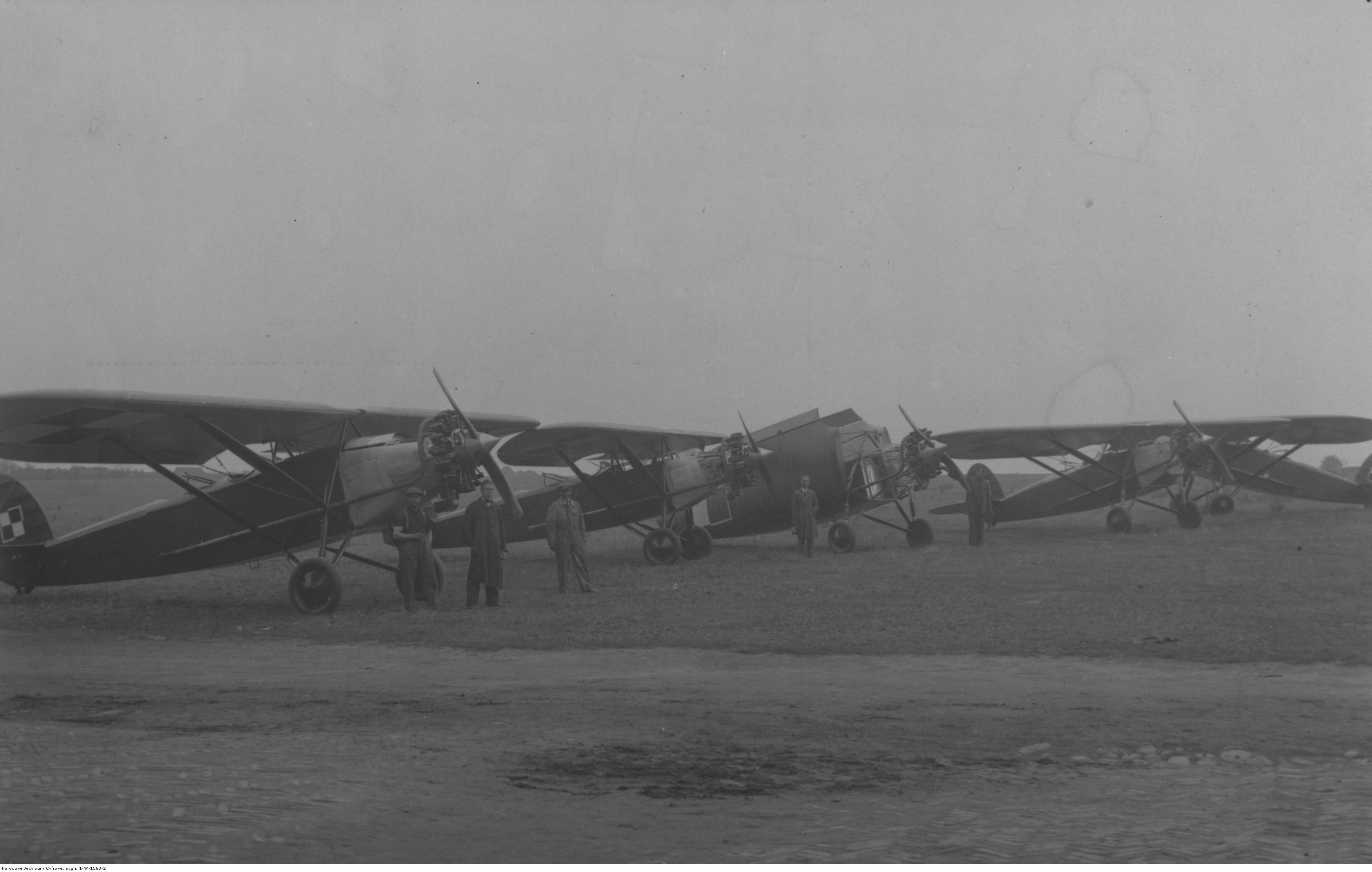 5 seryjnych samolotów Lublin R-X na lotnisku.